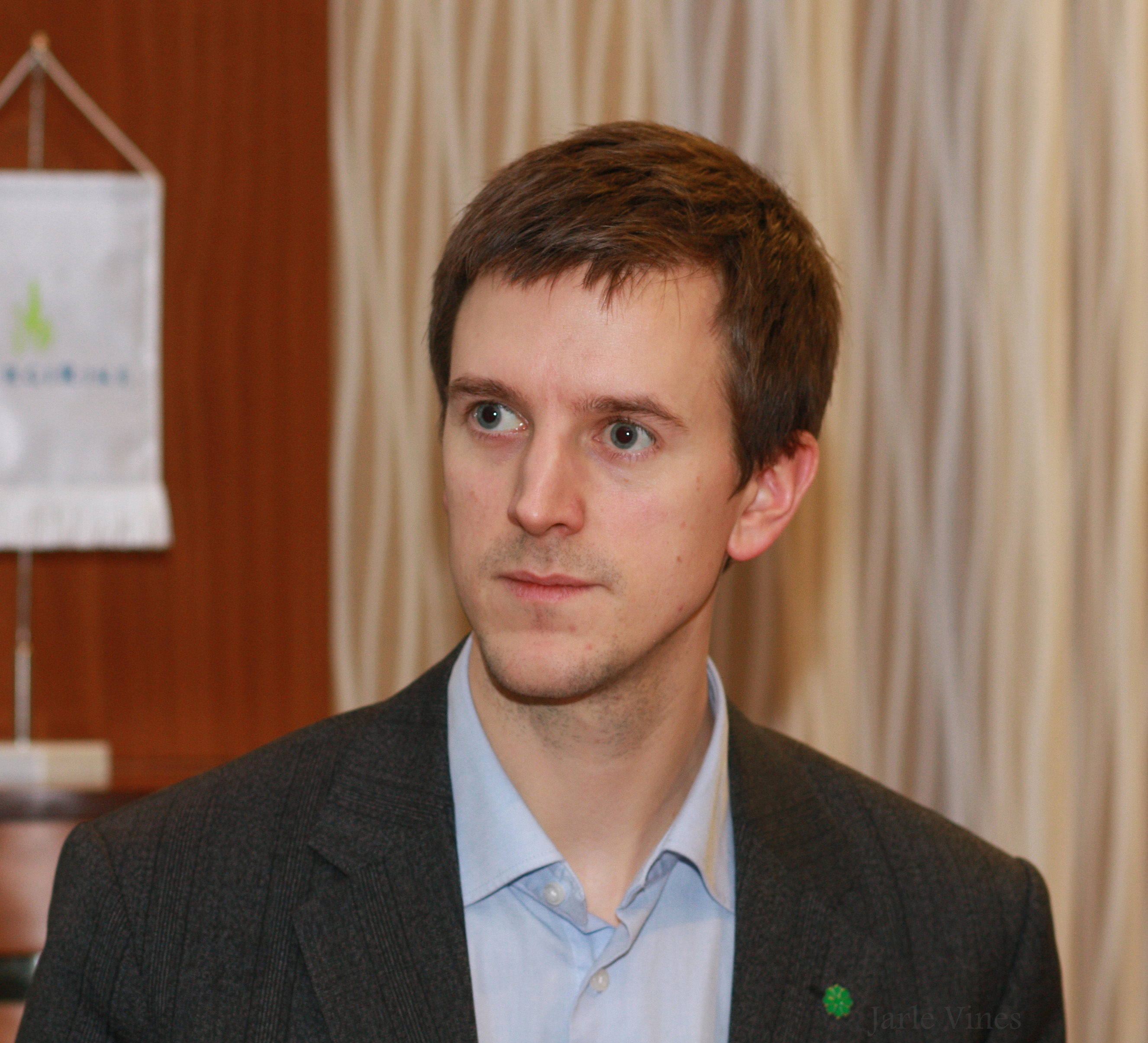 Erling Sande